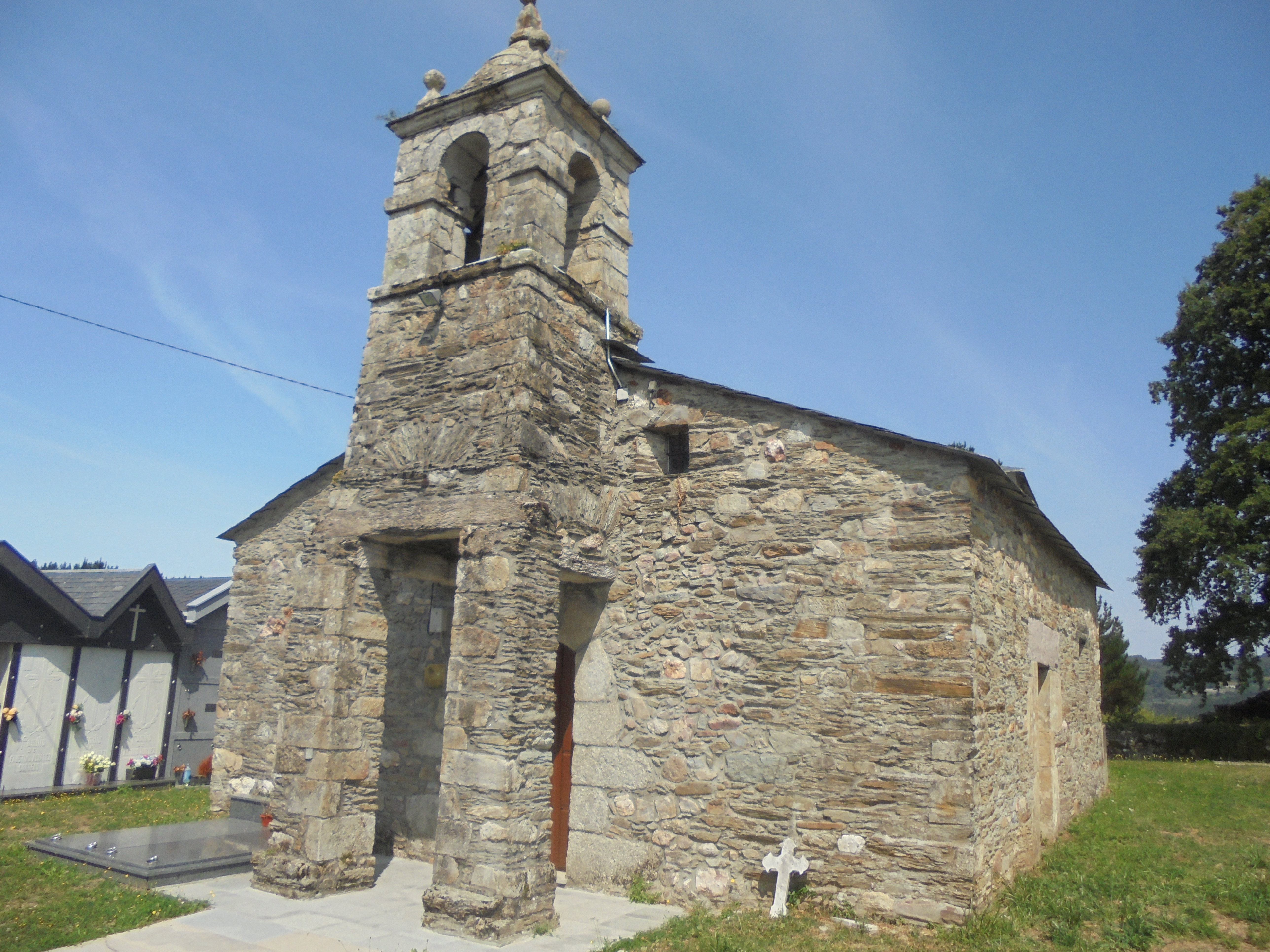 Igrexa de Pedrafita de Camporredondo- Baralla